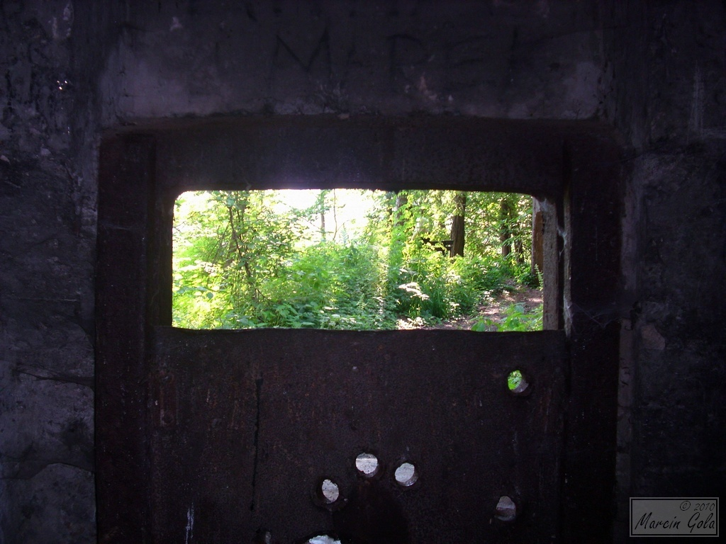 Schron Waligóra w Węgierskiej Górce (wewnątrz)